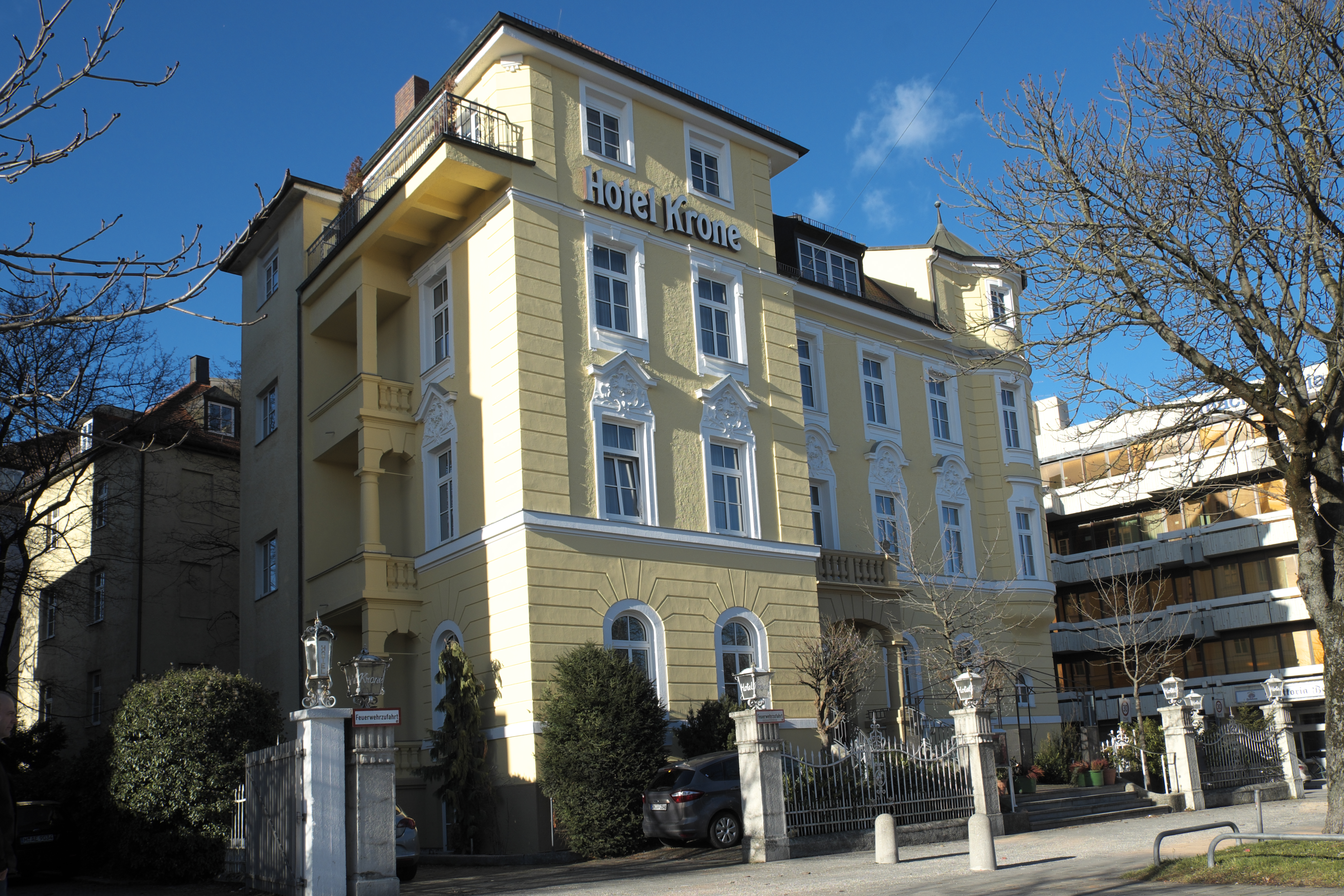 Hotel Krone an der Theresienhöhe 8 im Stadtbezirk Schwanthalerhöhe in München (Bayern/Deutschland), 1897/98 von Ignaz Batz erbaut